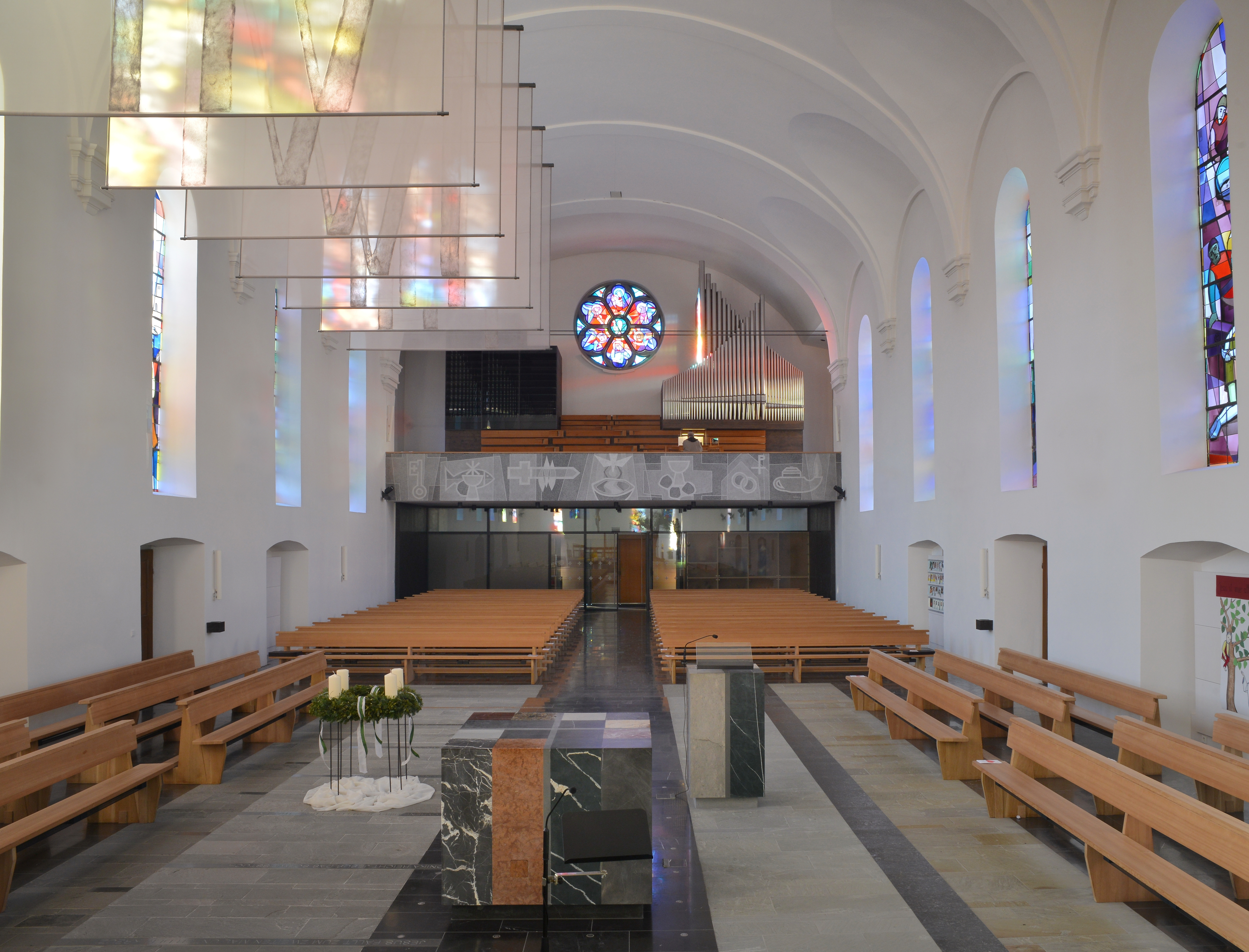 Pfarrkirche hl. Johannes d.T. nach dem Umbau 2010 in Lingenau im Bregenzerwald.